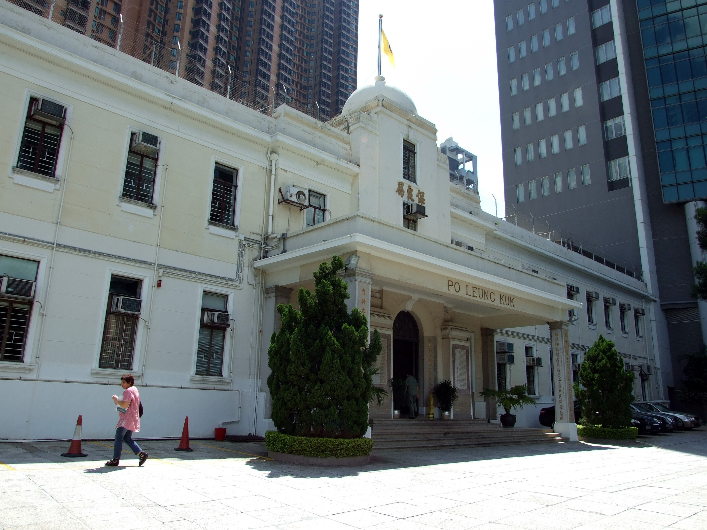 中文（香港）: 保良局主樓